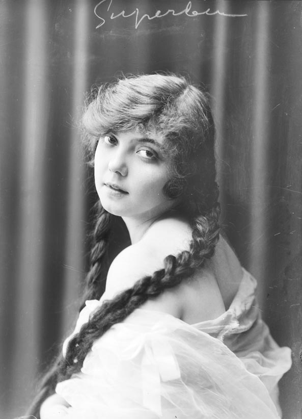 Retrat de bust de la soprano Concepció "Conxita" Supervia i Pascual.